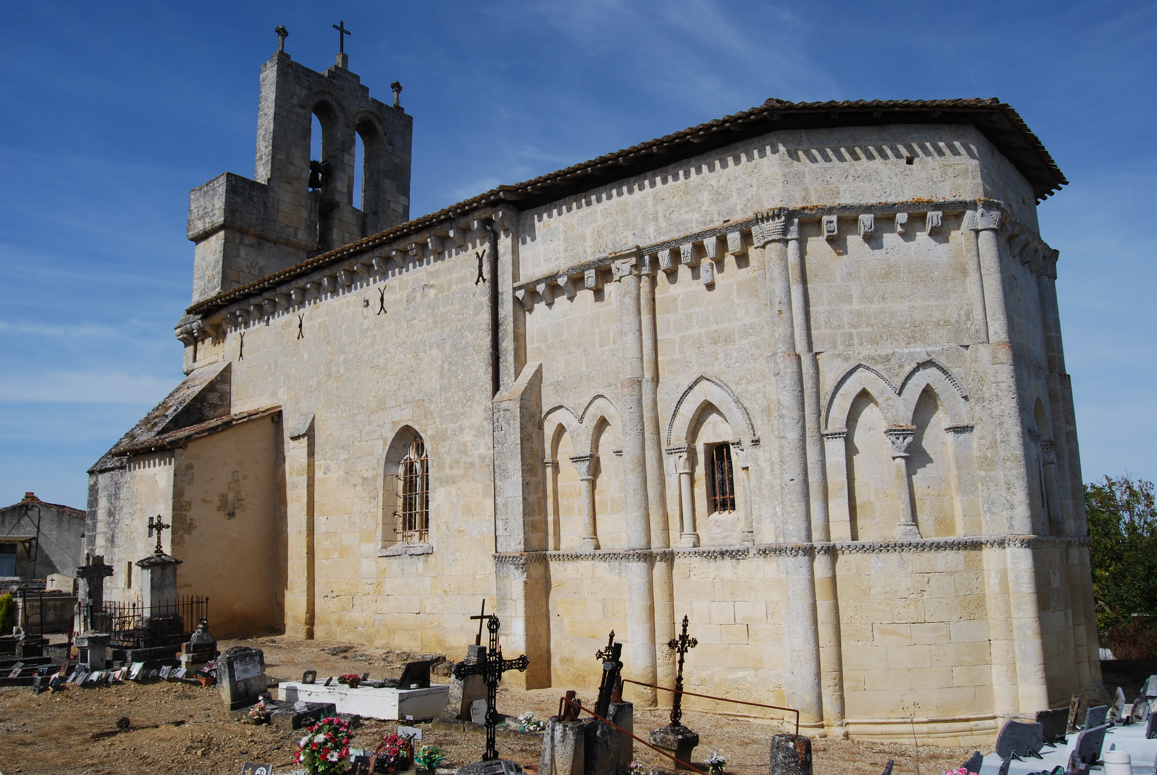 Église Saint-Saturnin de Camarsac, (Inscrit, 1925) .